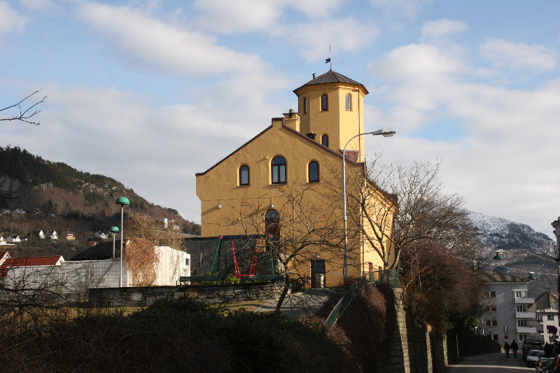 Corps de Garde, Bergen, Norway